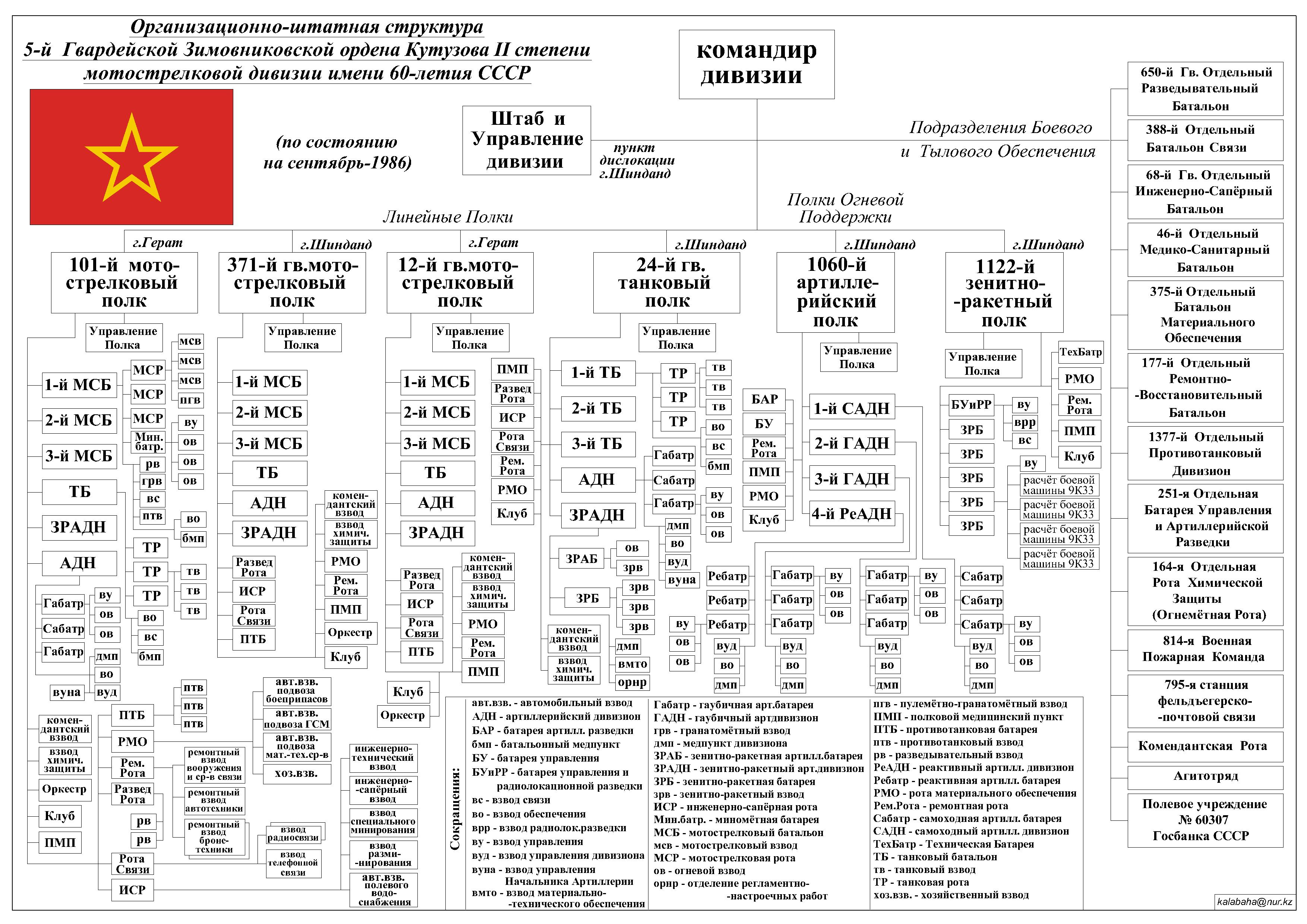 Организационно-штатная структура 5-й Зимовниковской орденa Кутузова II степени мотострелковой дивизии имени 60-летия СССР. По состоянию на октябрь-1986. Схема составлена по материалам Бешкарёва Александра Ивановича "ПЕРЕЧЕНЬ СОВЕТСКИХ ВОИНСКИХ ЧАСТЕЙ В АФГАНИСТАНЕ (1979-1989 гг.)", а также по данным сайта 5-й гв.мсд. Отчерчено в AutoCAD 2005 собственноручно. Источник данных - и